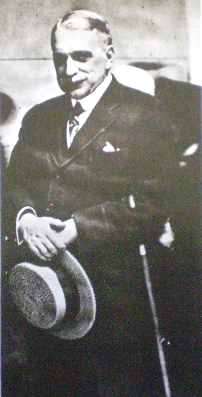 Tomás Le Breton